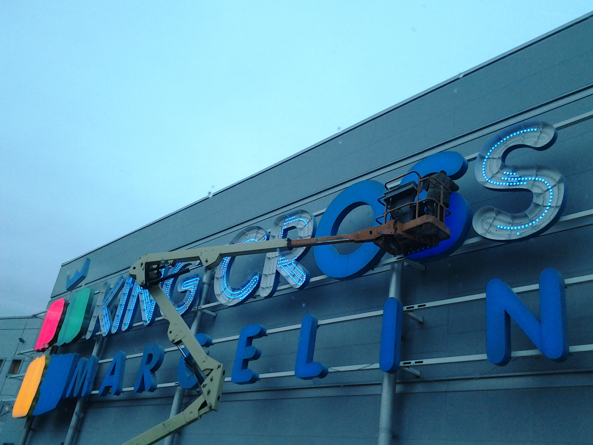 Naprawa neonu na King Crossie Marcelin w Poznaniu.